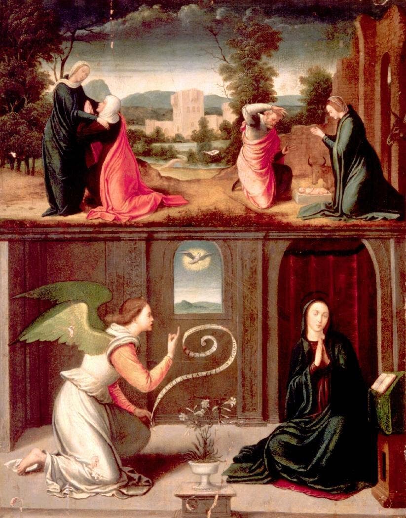 La obra representa, en el segmento inferior, la Anunciación del arcángel San Gabriel a la Virgen María, y en la parte superior aparecen representados el nacimiento de Cristo y la visitación de la Virgen María a su prima Santa Isabel.